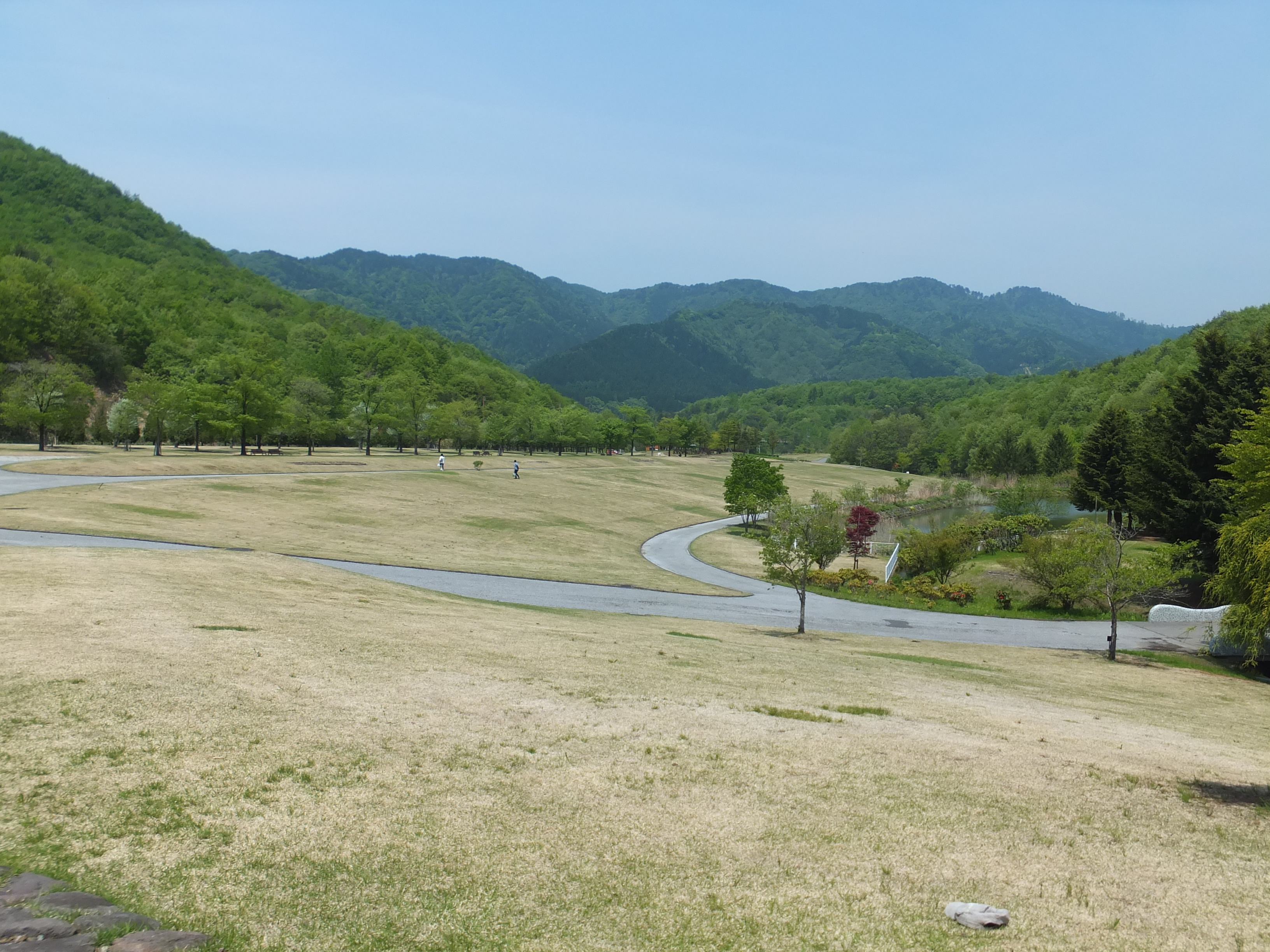 秋田県秋田市、太平山リゾート公園 花公園・エントランス広場。1982年から89年まで営業していた仁別レジャーランドの跡地に造成された。